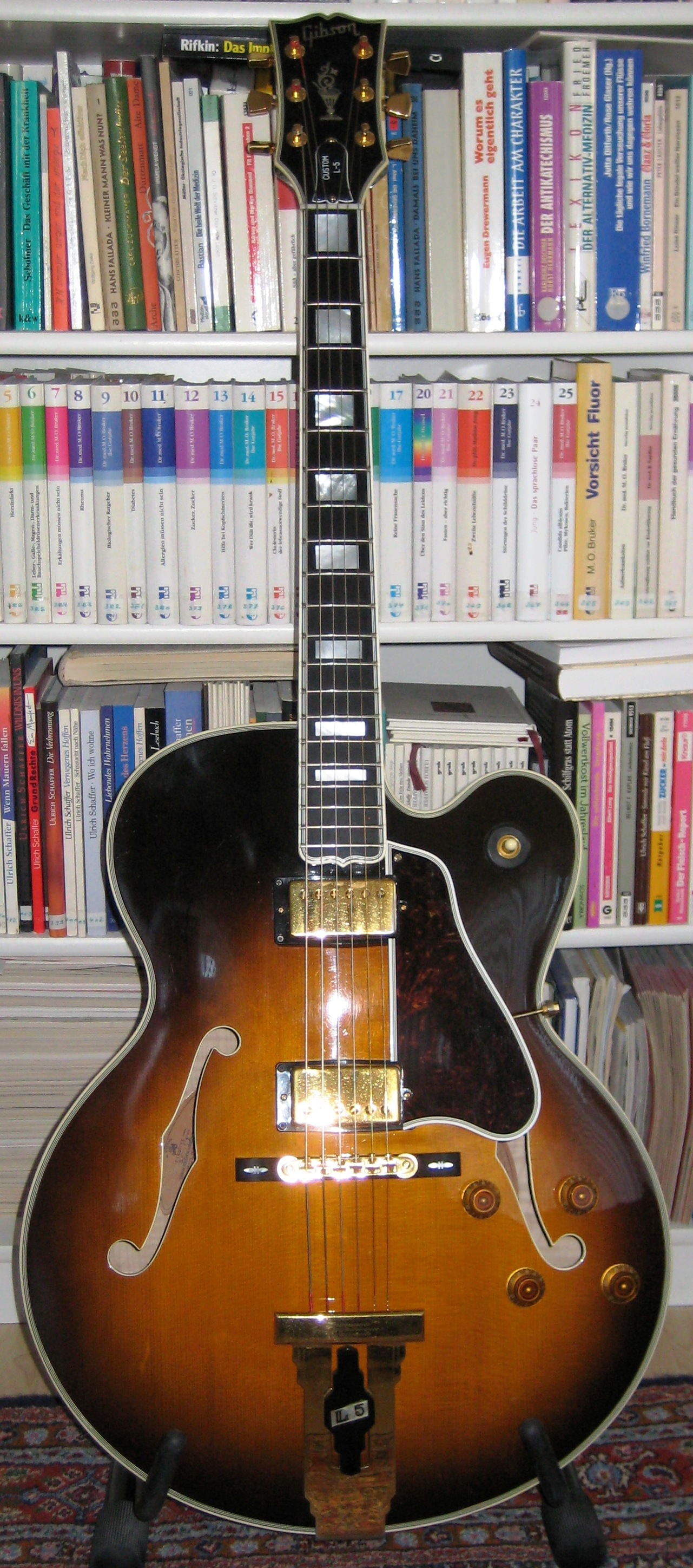 Gibson L-5 CES Tobacco Burst